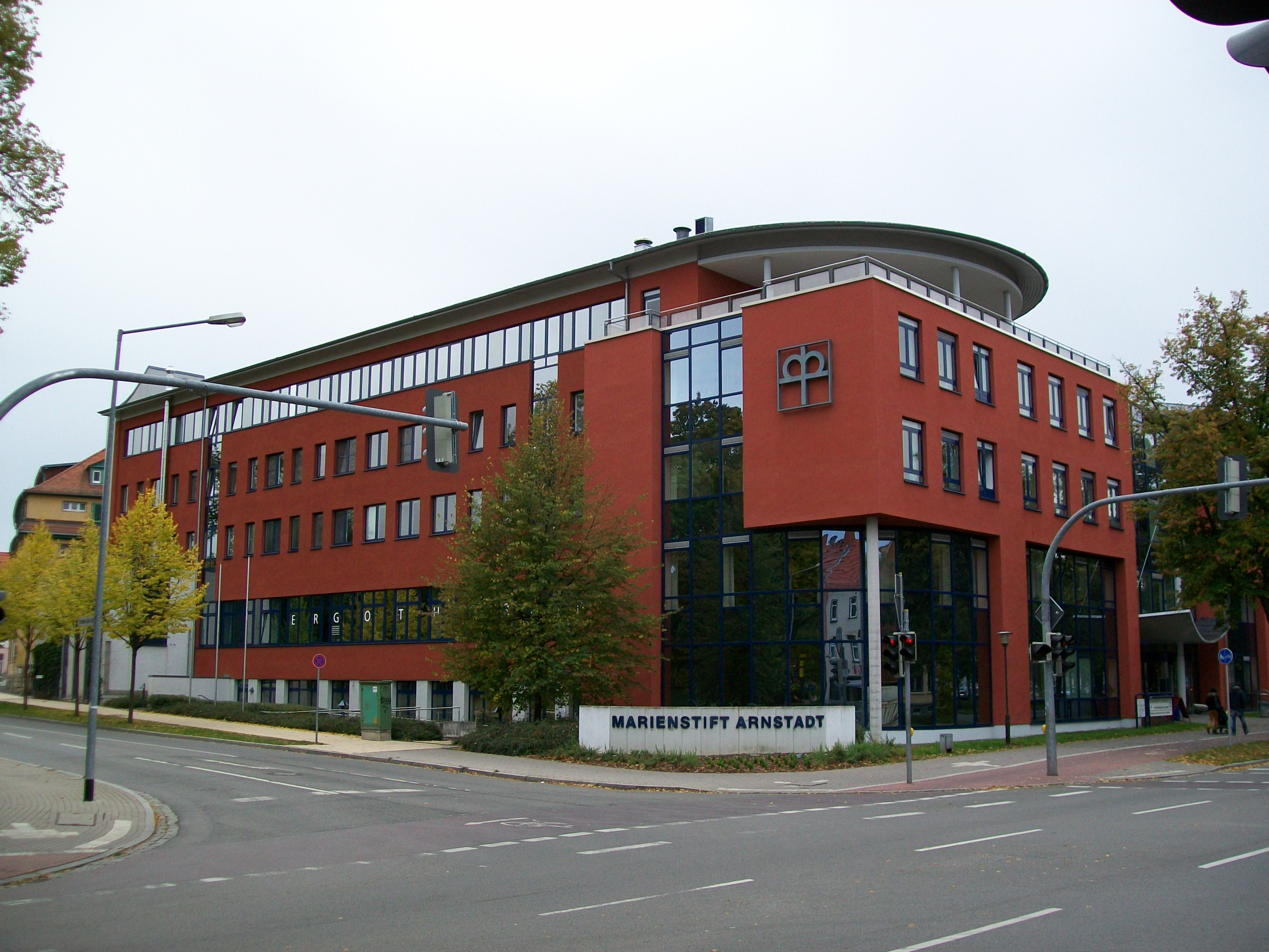 Marienstift in Arnstadt (Deutschland), HauptgebäudeEsperanto: La fondaĵo Marienstift en Arnstadt (Germanio), ĉefa konstruaĵo